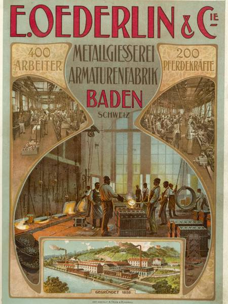 Oederlin, Obersiggenthal AG, Schweiz